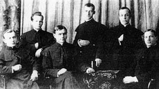 Удзельнікі беларускага гуртка ў Рыма-каталіцкай духоўнай акадэміі ў Пецярбургу на пачатку 1917 г. Злева направа: Міхал Пятроўскі, Антон Матвейчык, Андрэй Цікота, Антон Неманцэвіч, Карл Лупіновіч, Адам Станкевіч.